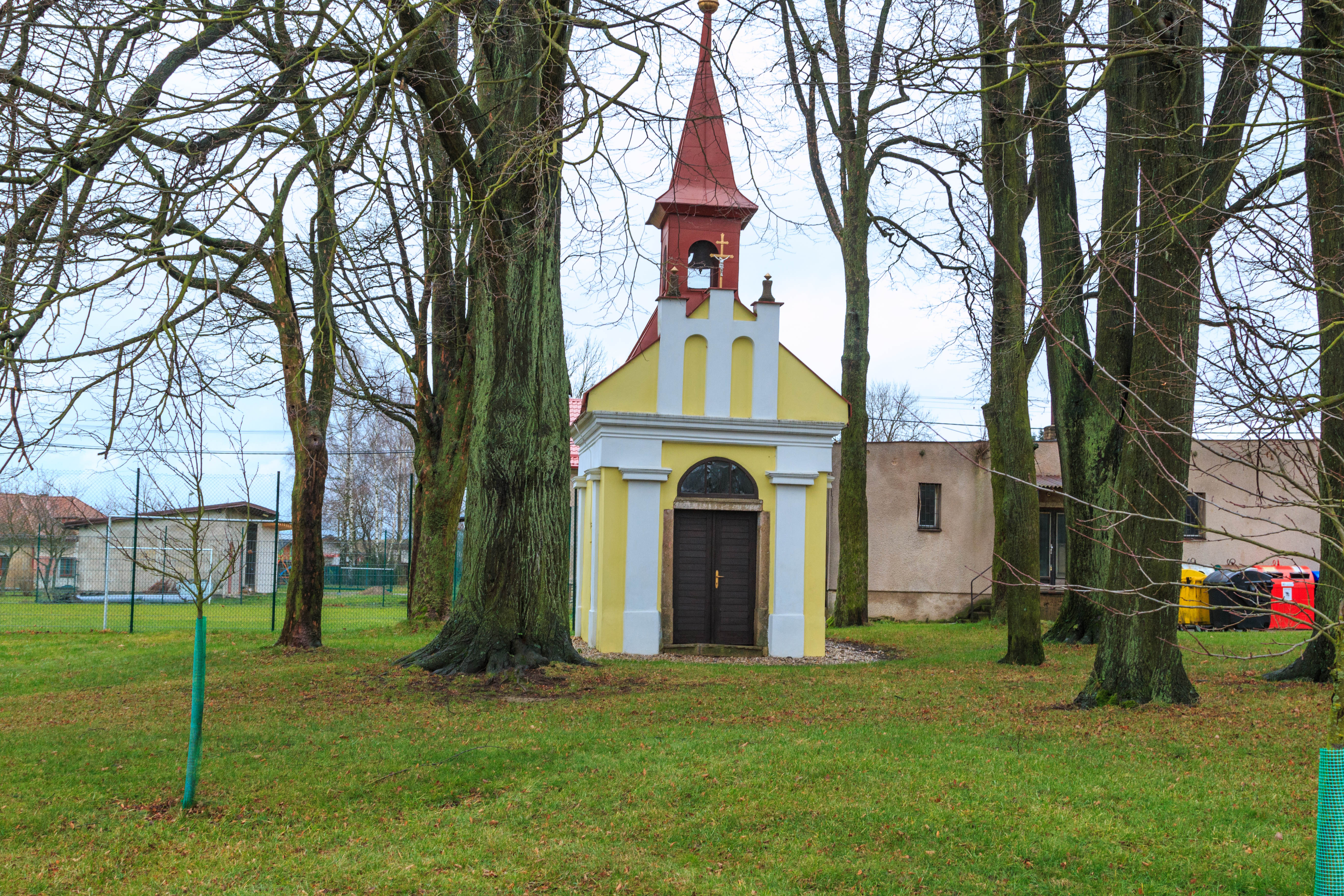 Radostín kaplička